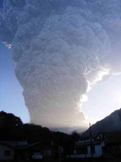 Columna de cenizas del volcán Chaitén, durante el pulso eruptivo del 6 de mayo de 2008.